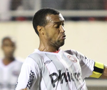 Lucas Severino während der Partie zwischen Rio Branco und Atlético Paranaense (Copa do Brasil, 23. Februar 2011)